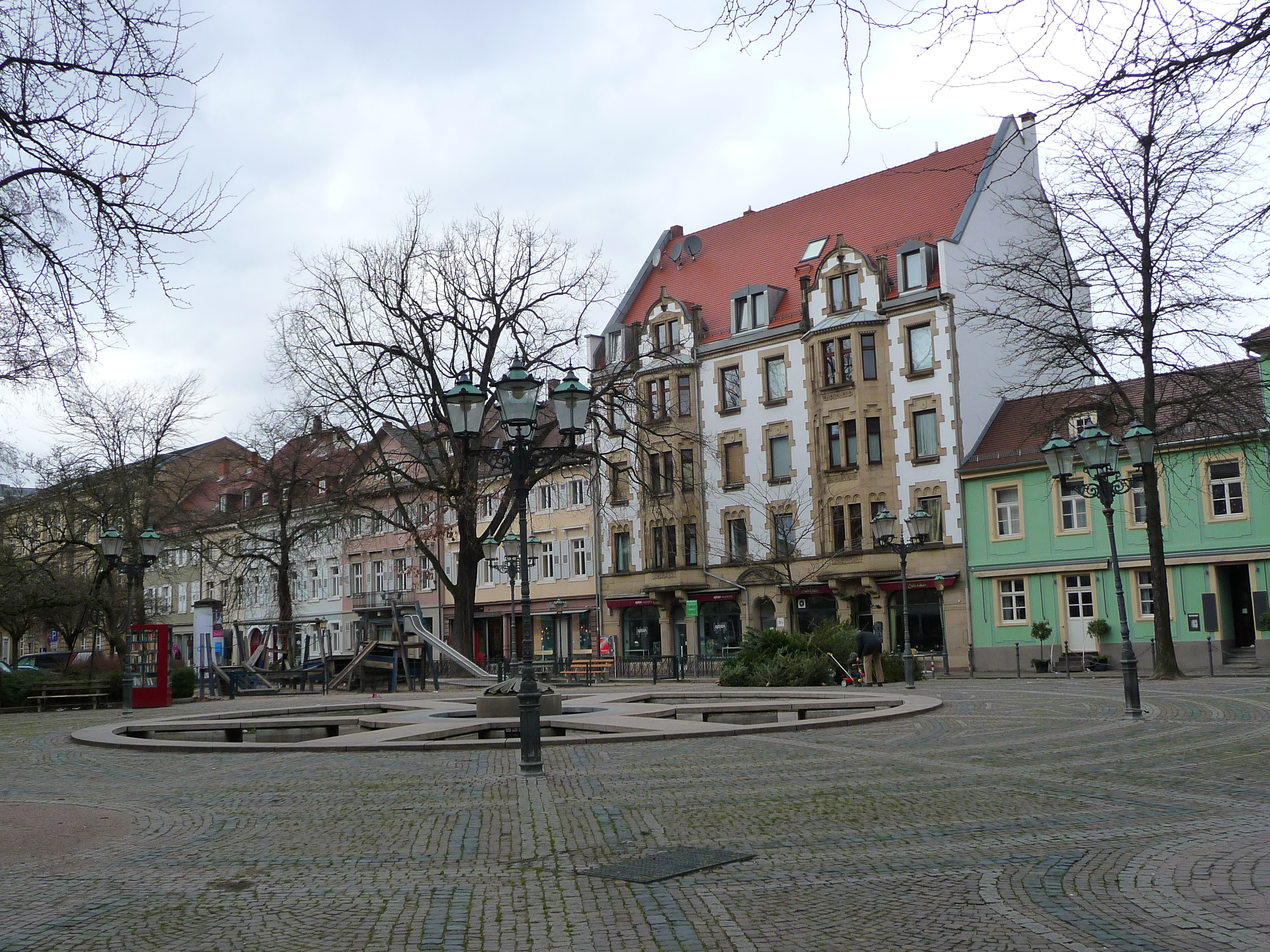 Lidellplatz in Karlsruhe (Baden-Württemberg, Deutschland)